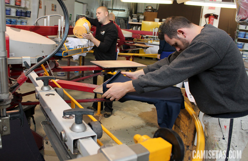 Estampador pone camiseta en pulpo de serigrafía para estampar.